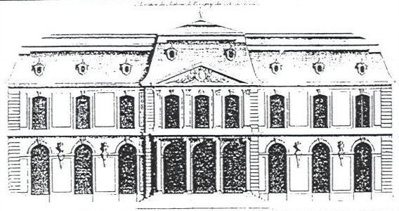 Elevation du château Desgots pour Perrigny